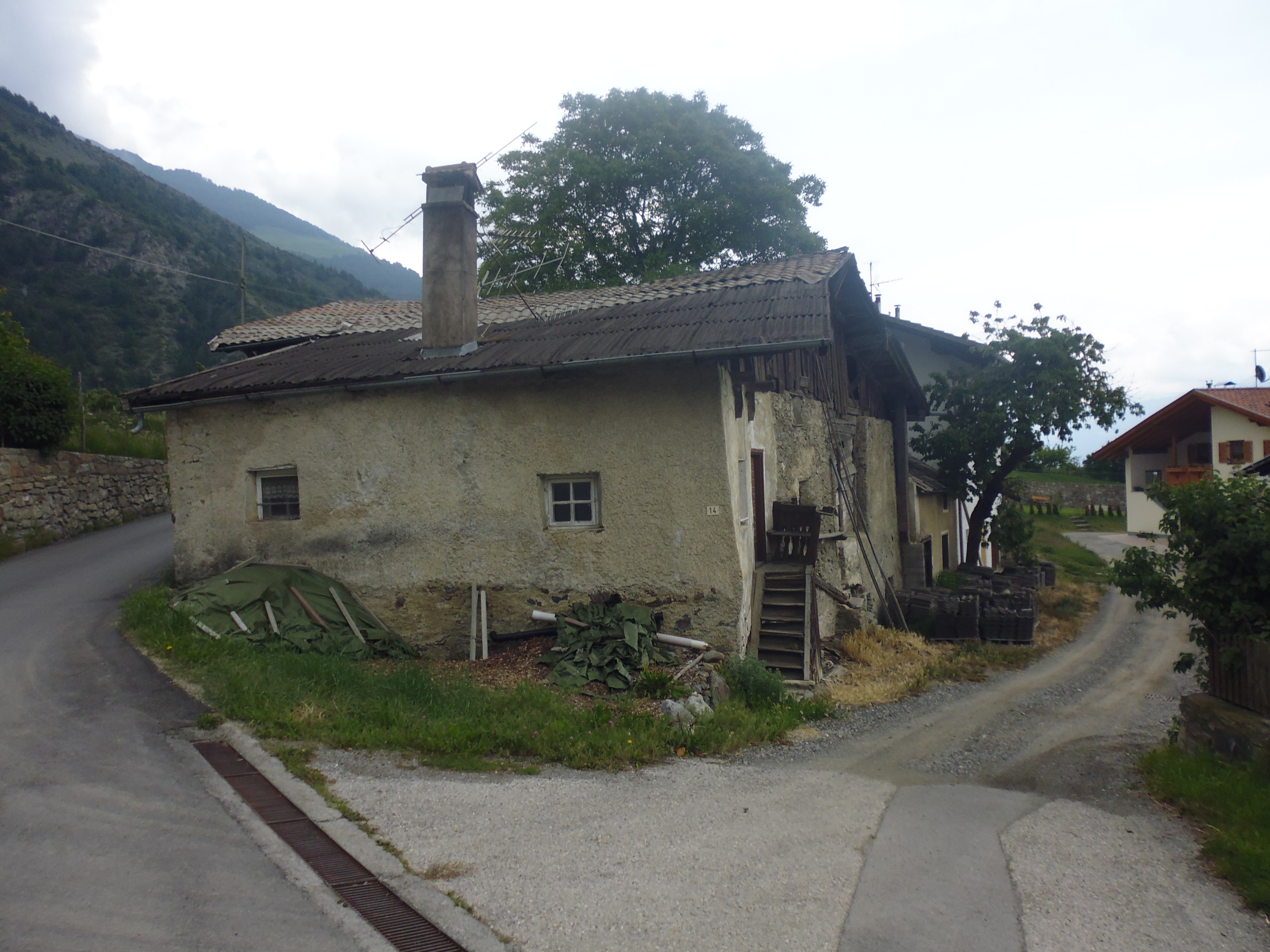 Aufgegebener Hof in Allitz